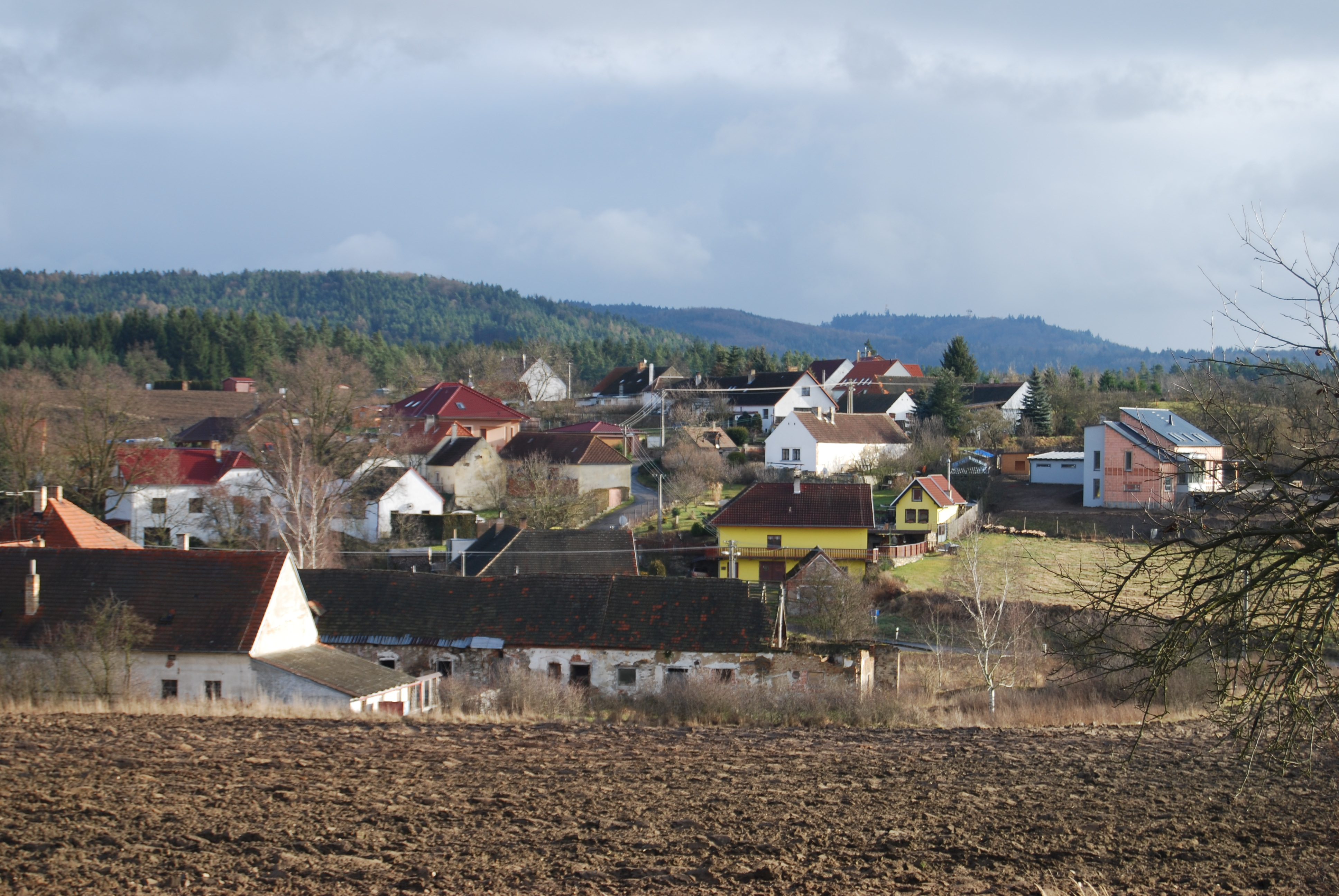 Topělec je vesnice, část obce Čížová v okrese Písek. Česká republika.